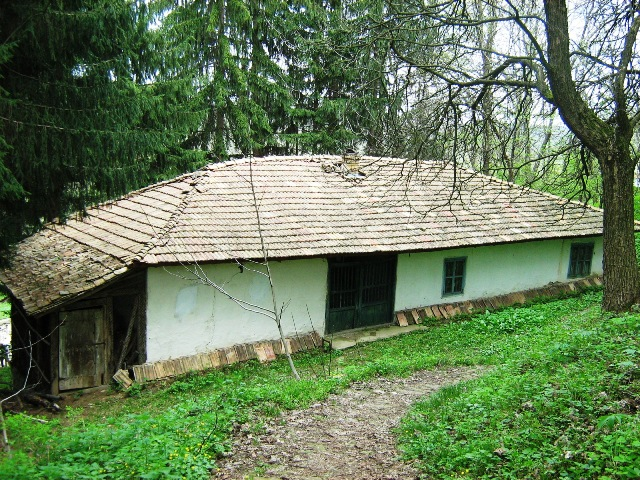 Джамията, която се намира с централната част на село Долна Кабда. Фото: Вл. Стойков - април 2008 год.